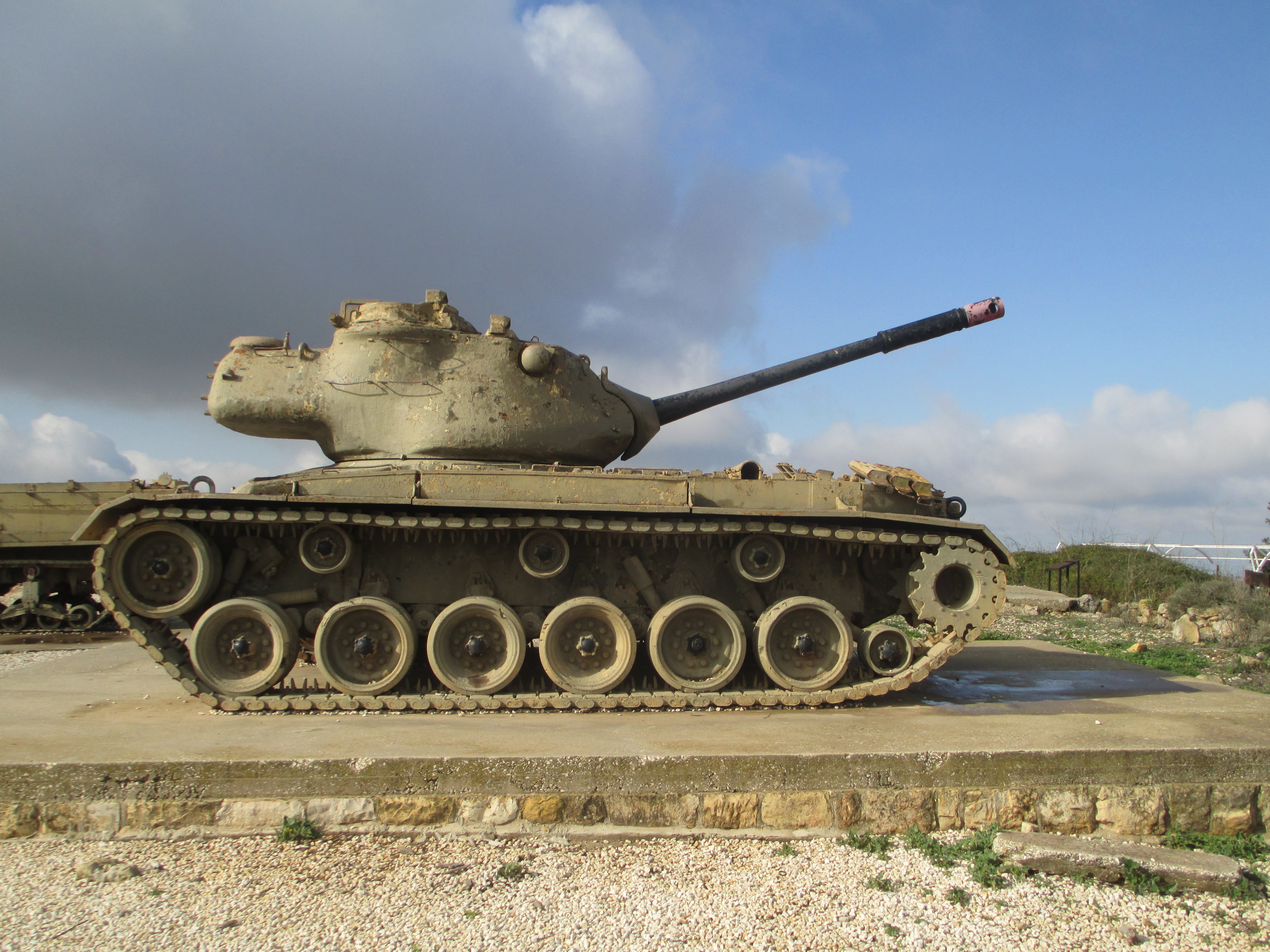 טנק פטון M47 שהיה בשימוש הצבא הירדני והשתתף בקרב בתל אל פול במלחמת ששת הימים.